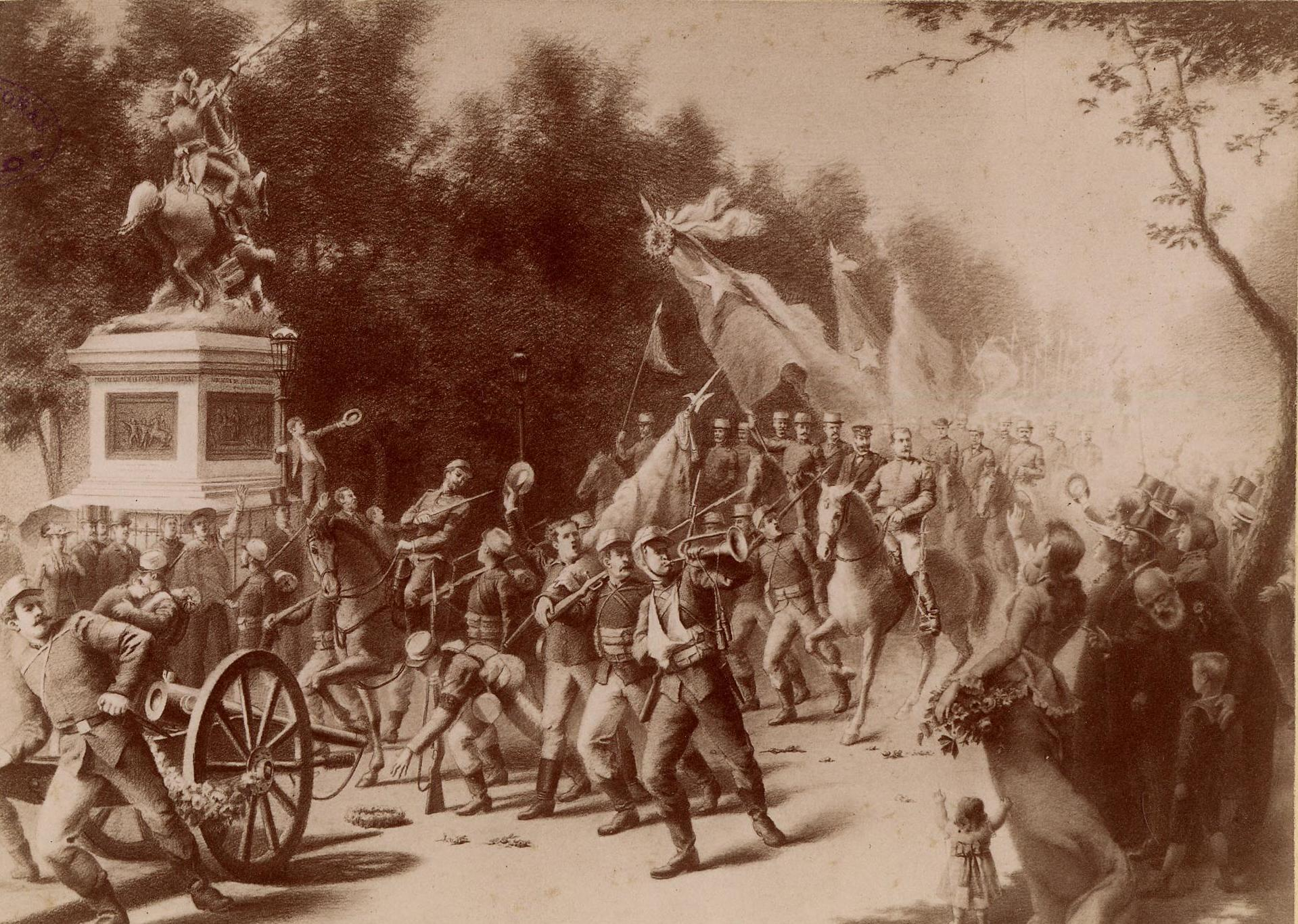 [Alegoría de la entrada del Ejército Constitucional a Santiago en 1891, se distinguen el General del Canto, Jorge Montt entre otros militares] [fotografía].